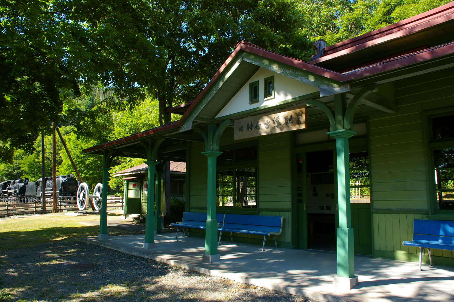 JNR Kamuikotan station, Asahikawa city hokkaido.